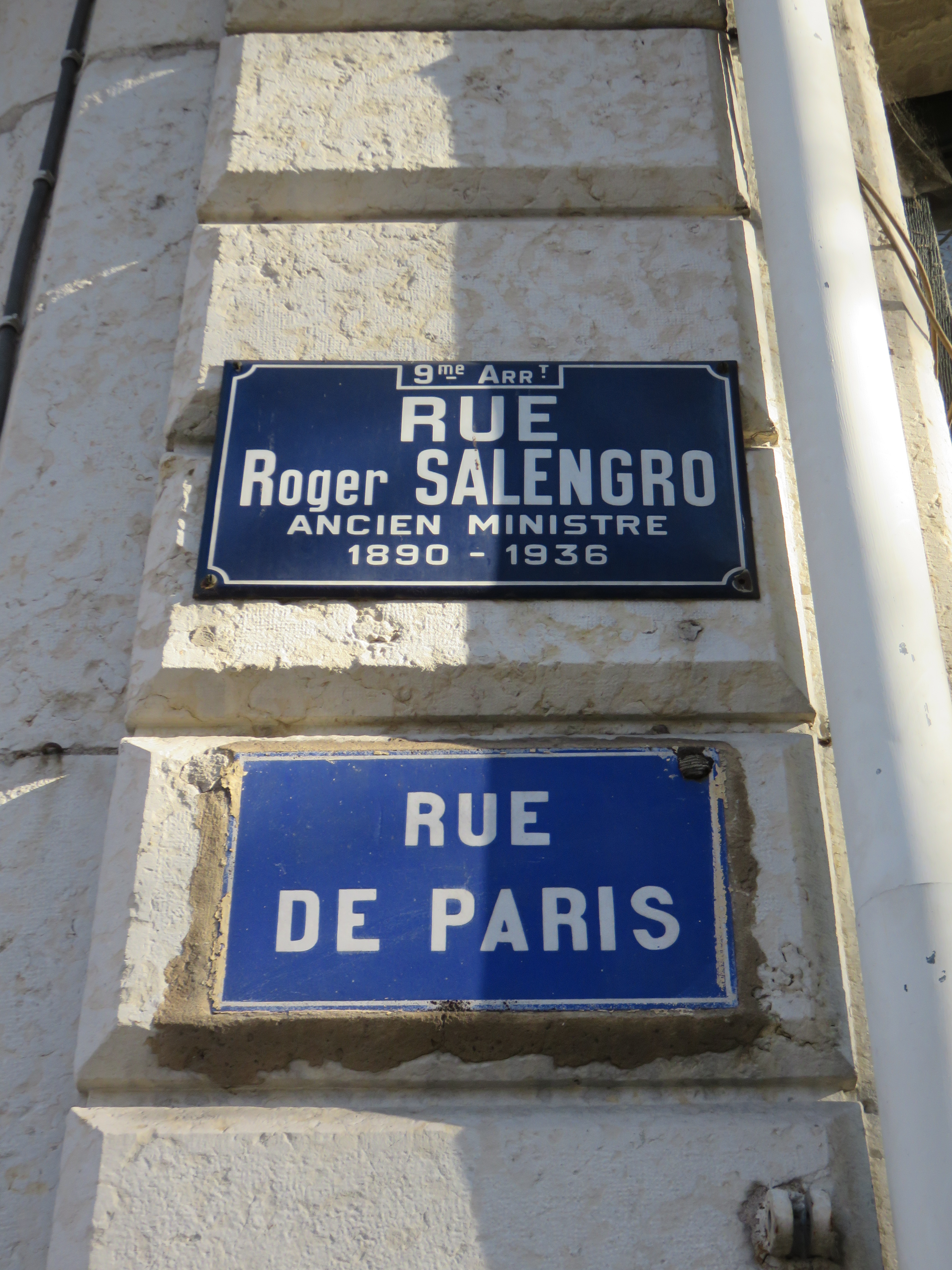 Plaque de la rue Roger-Salengro et plaque de l'ancien nom de la rue, la rue de Paris, dans le 9e arrondissement de Lyon. La rue a été renommé après son décès en 1936.